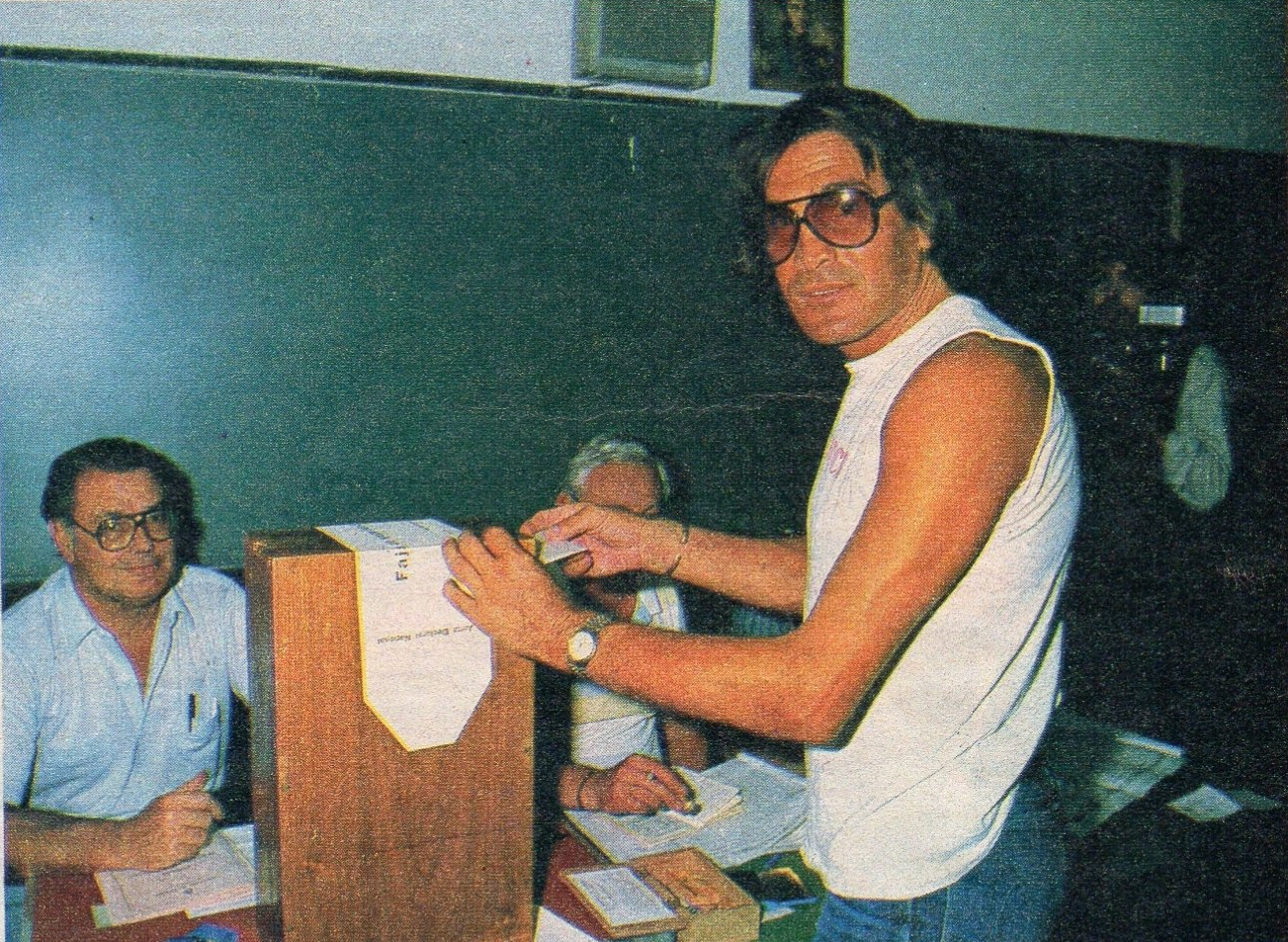 Hugo Orlando Gatti, arquero de Boca Juniors, votando en las elecciones presidenciales de Argentina de 1983.